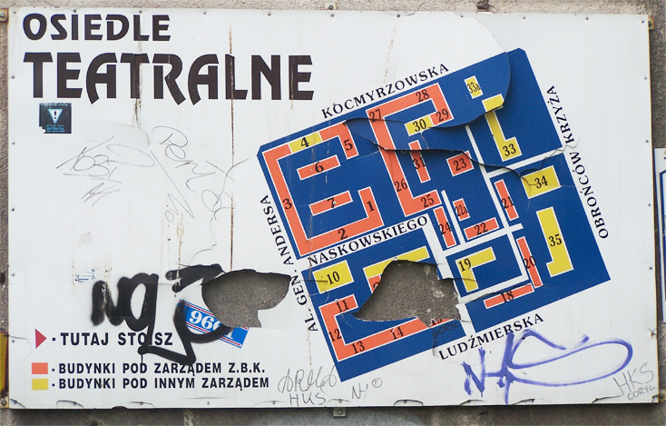 Plan - os. Teatralne, Krakow